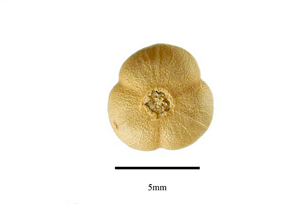 Peganum harmala seed cluster